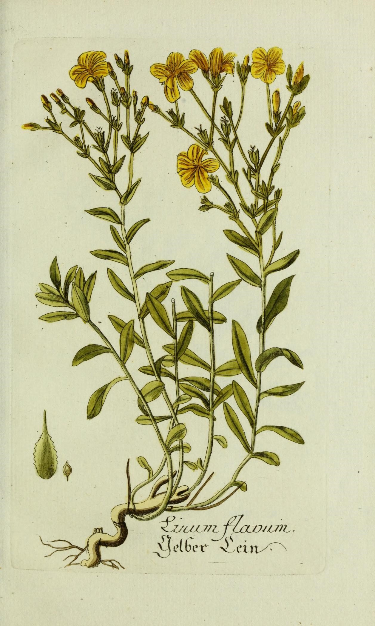 Plantarum indigenarum et exoticarum icones ad vivum coloratae, oder, Sammlung nach der Natur gemalter Abbildungen inn- und ausländlischer Pflanzen, für Liebhaber und Beflissene der Botanik /